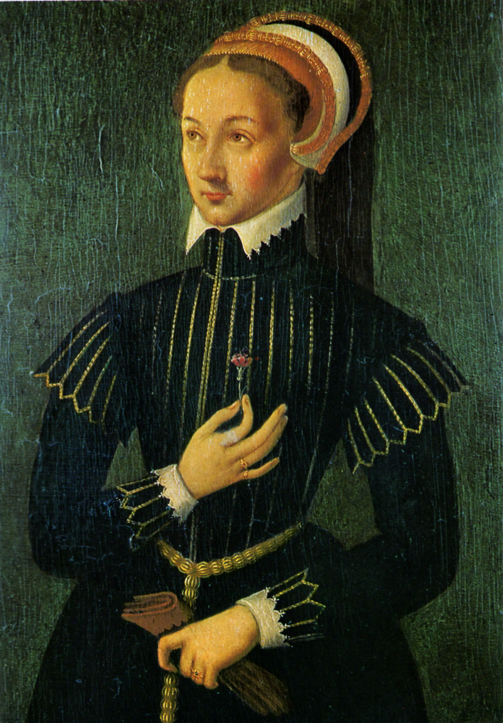 Ce portrait était autrefois considéré comme étant le portrait de Claude de France (1499-1524). A tort, car les spécialistes ne le reconnaissent plus comme tel (voir le catalogue de Chantilly). Il s'agit du portrait d'une dame inconnue du milieu du XVIe siècle, vers 1550.